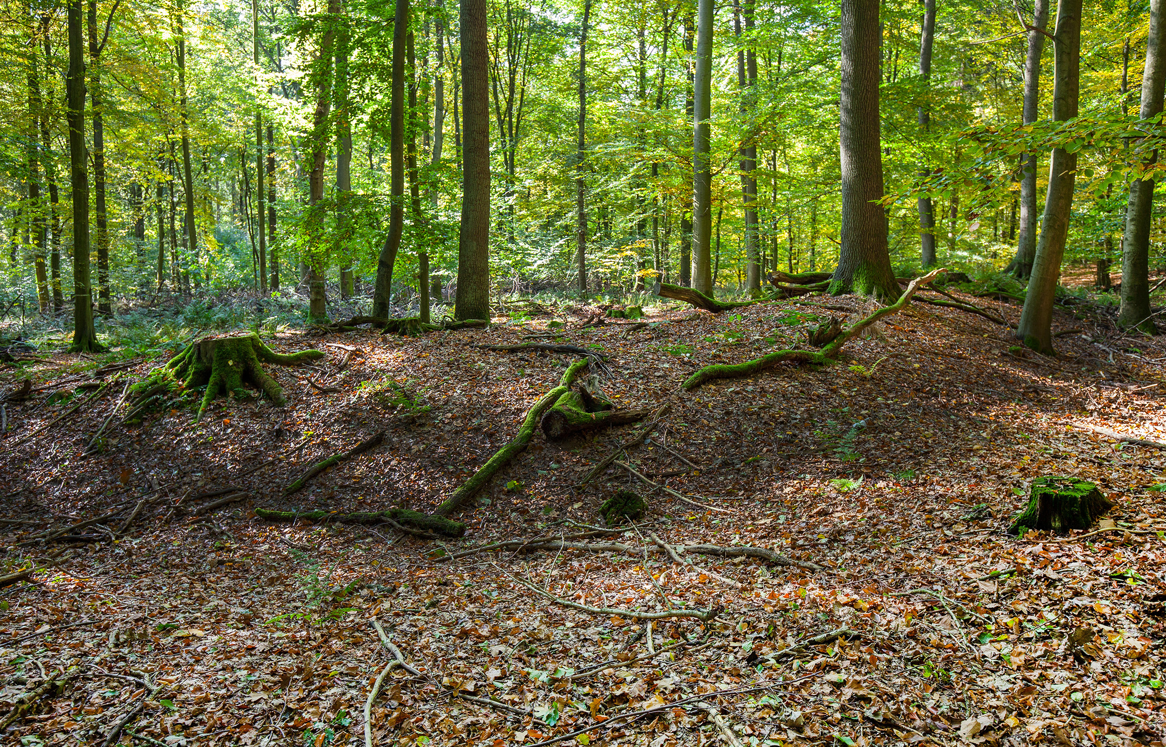 Wallanlage Siekholzer Schanze (Bodendenkmal) in Schieder-Schwalenberg, Kreis Lippe, Nordrhein-Westfalen. (Das Foto zeigt die Nordost-Ecke der Wallanlage - von außen)